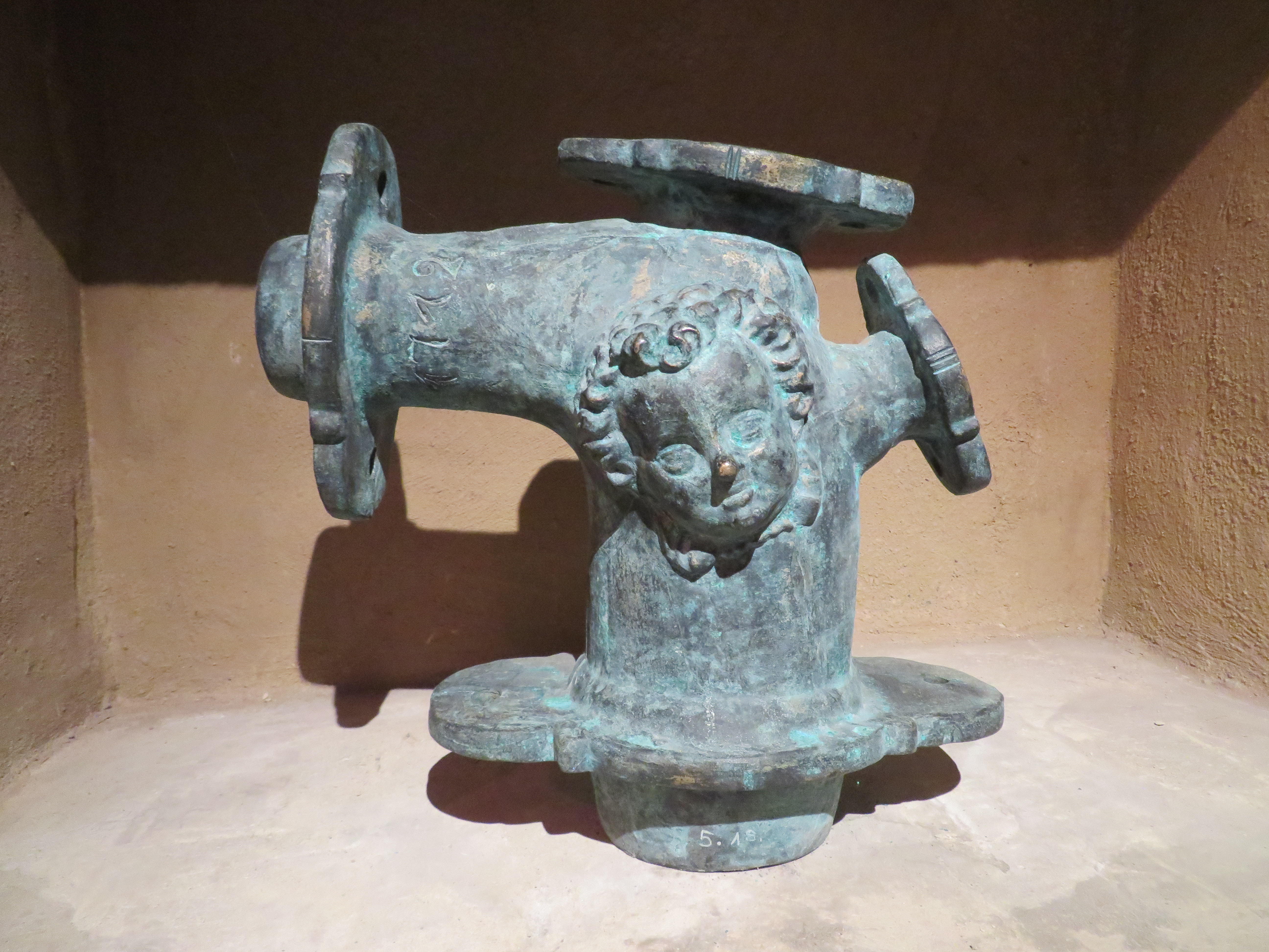 Impressionen aus dem Wassermuseum Seelhausbrunnenwerk in Ulm; mit einem Engelskopf verziertes Verteilerstück des alten Ulmer Wasserleitungssystems, im Jahr 1712 aus Glockguss gegossen von dem Ulmer Stück- und Glockengießer Theodosius Ernst dem Jüngeren; Ausstellungsstück im Seelhausbrunnenwerk-Museum beim Zundeltor in Ulm